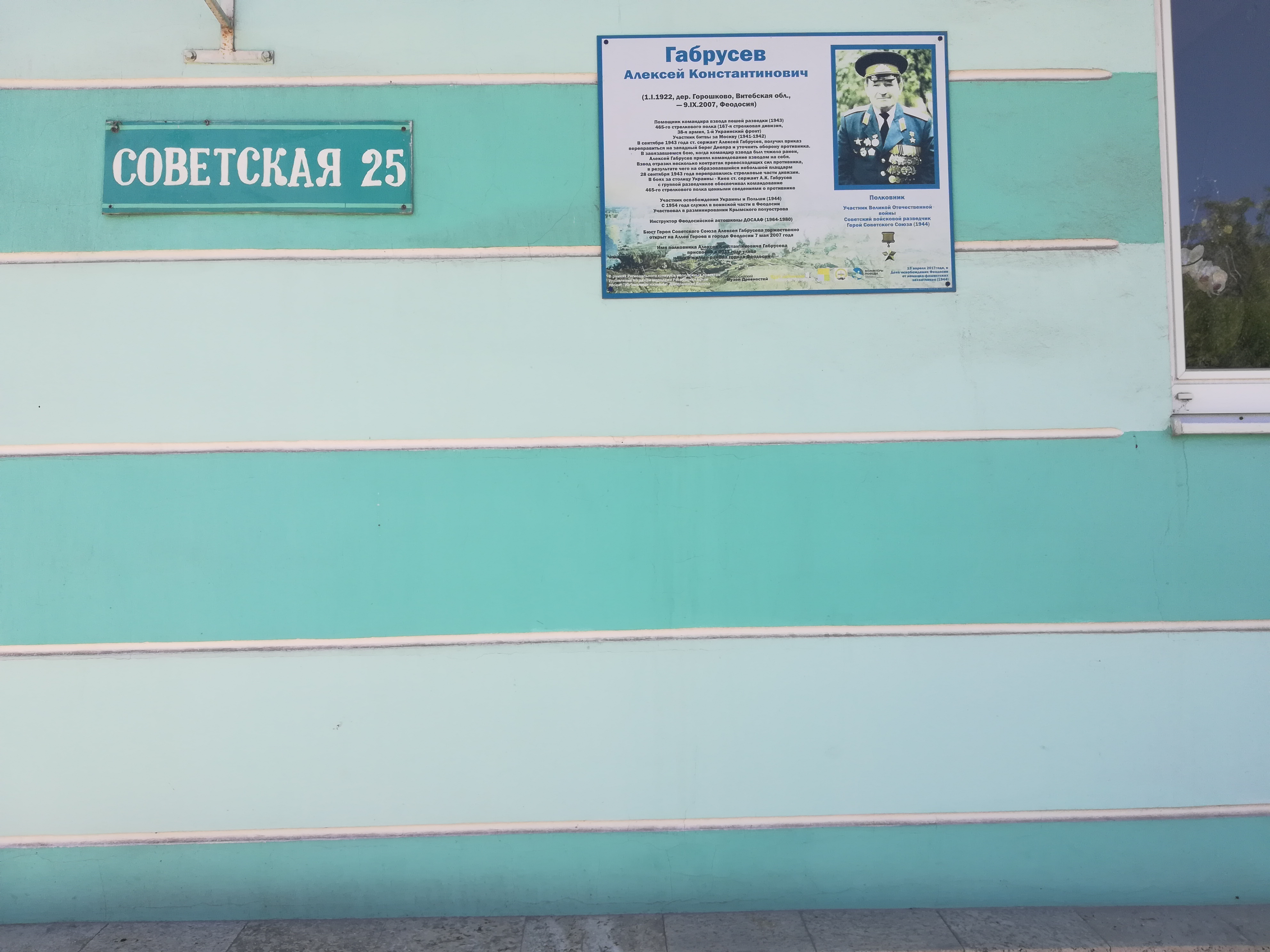 Советская улица